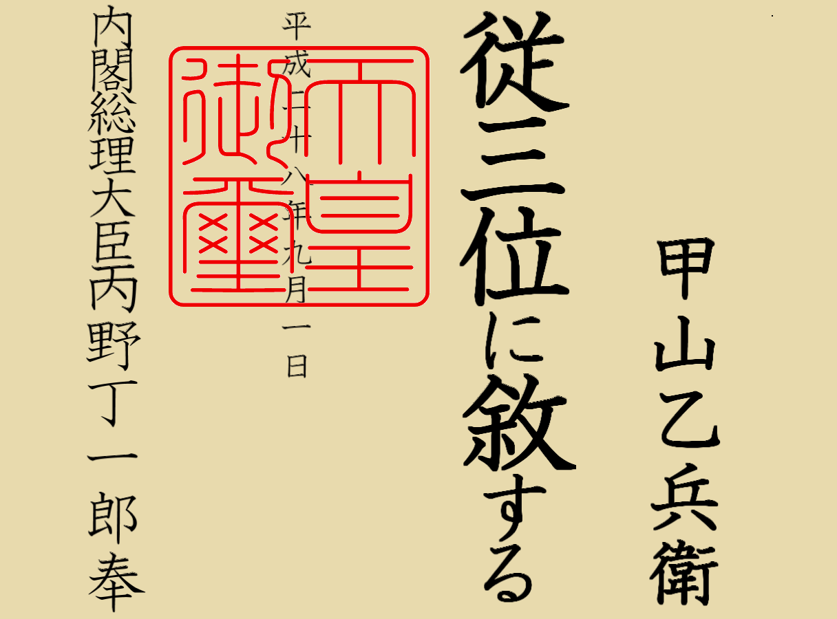 正一位の位記の様式